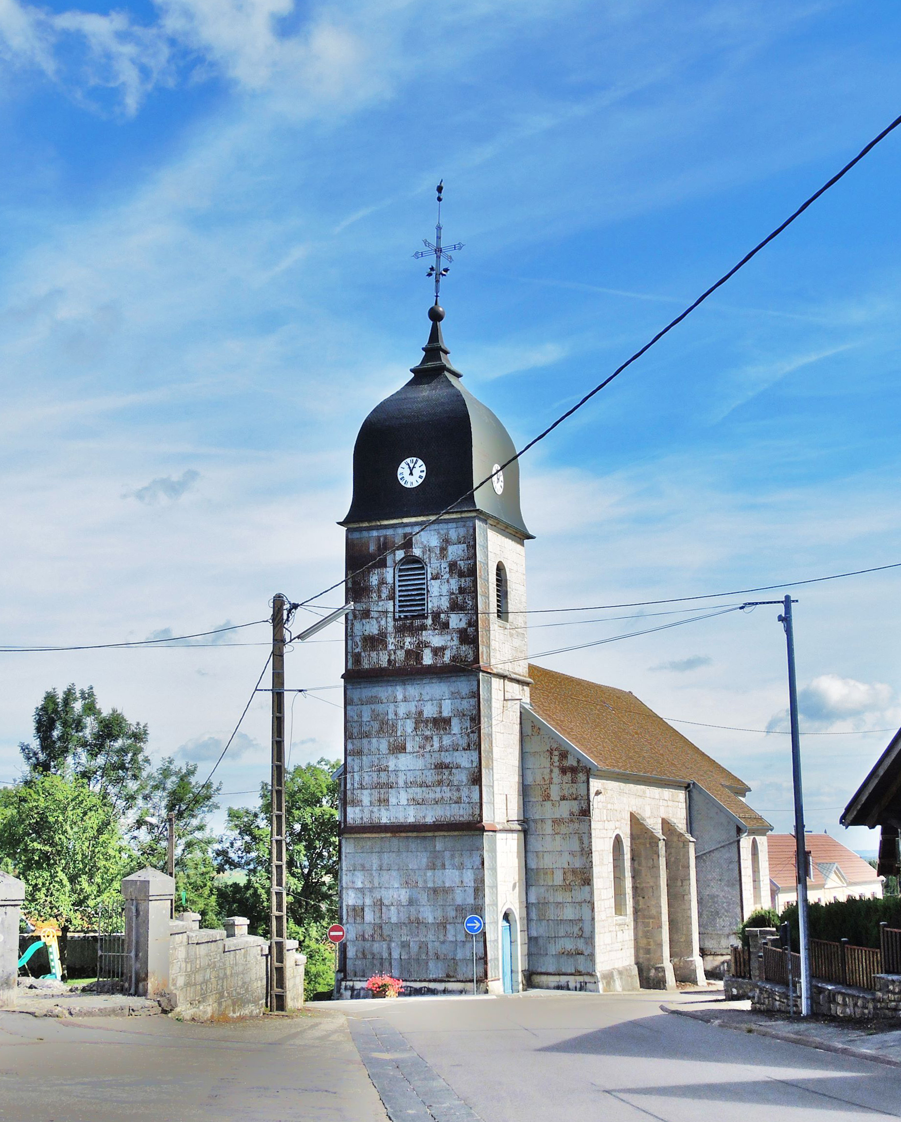 Eglise saint Martin de Passonfontaine